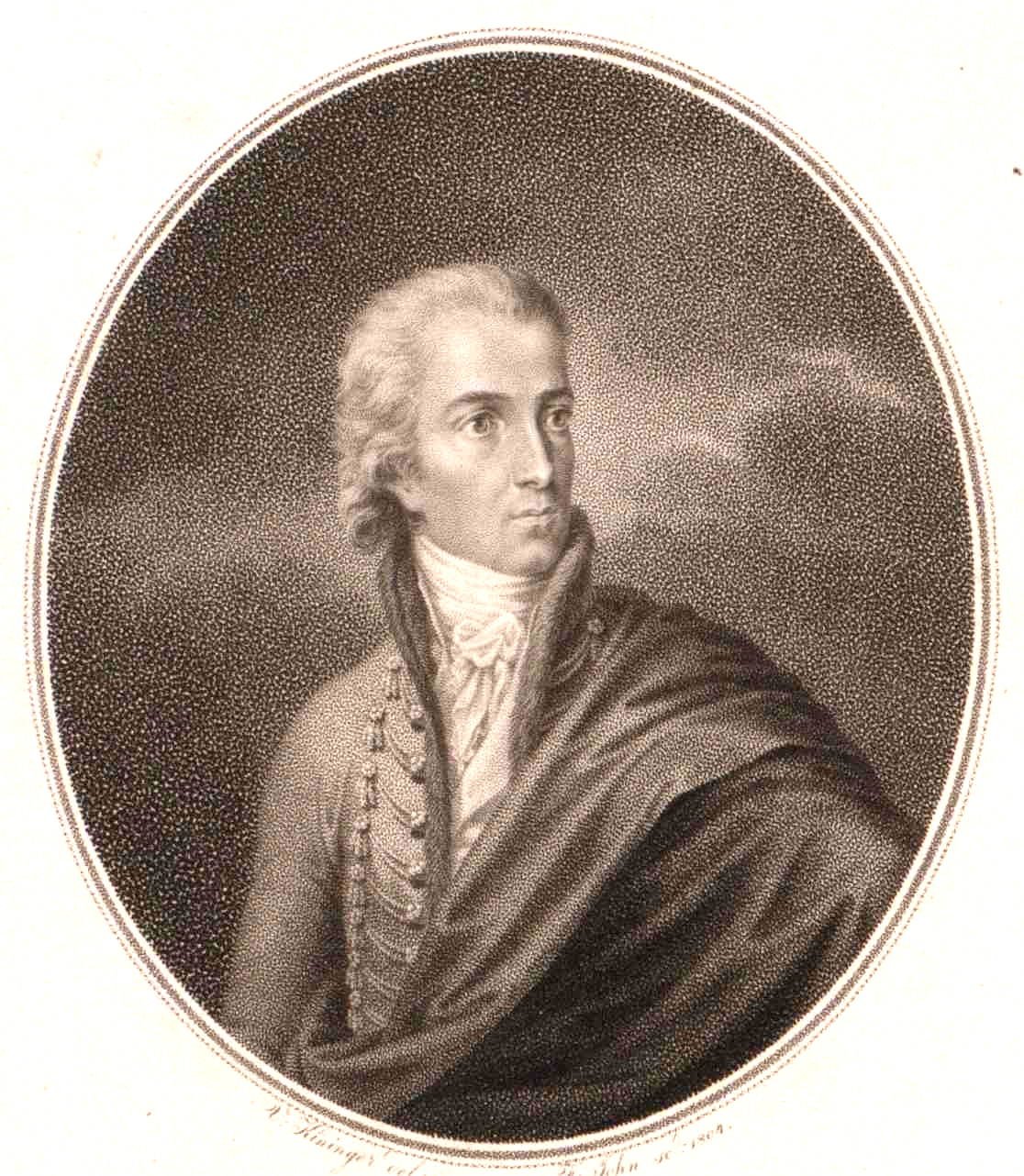 Kazinczi és alsóregmeczi Kazinczy Ferenc (Érsemjén, 1759. október 27. – Széphalom, 1831. augusztus 23.), magyar író, költő, a nyelvújítás vezéralakja